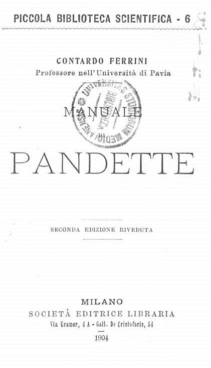 Frontespizio